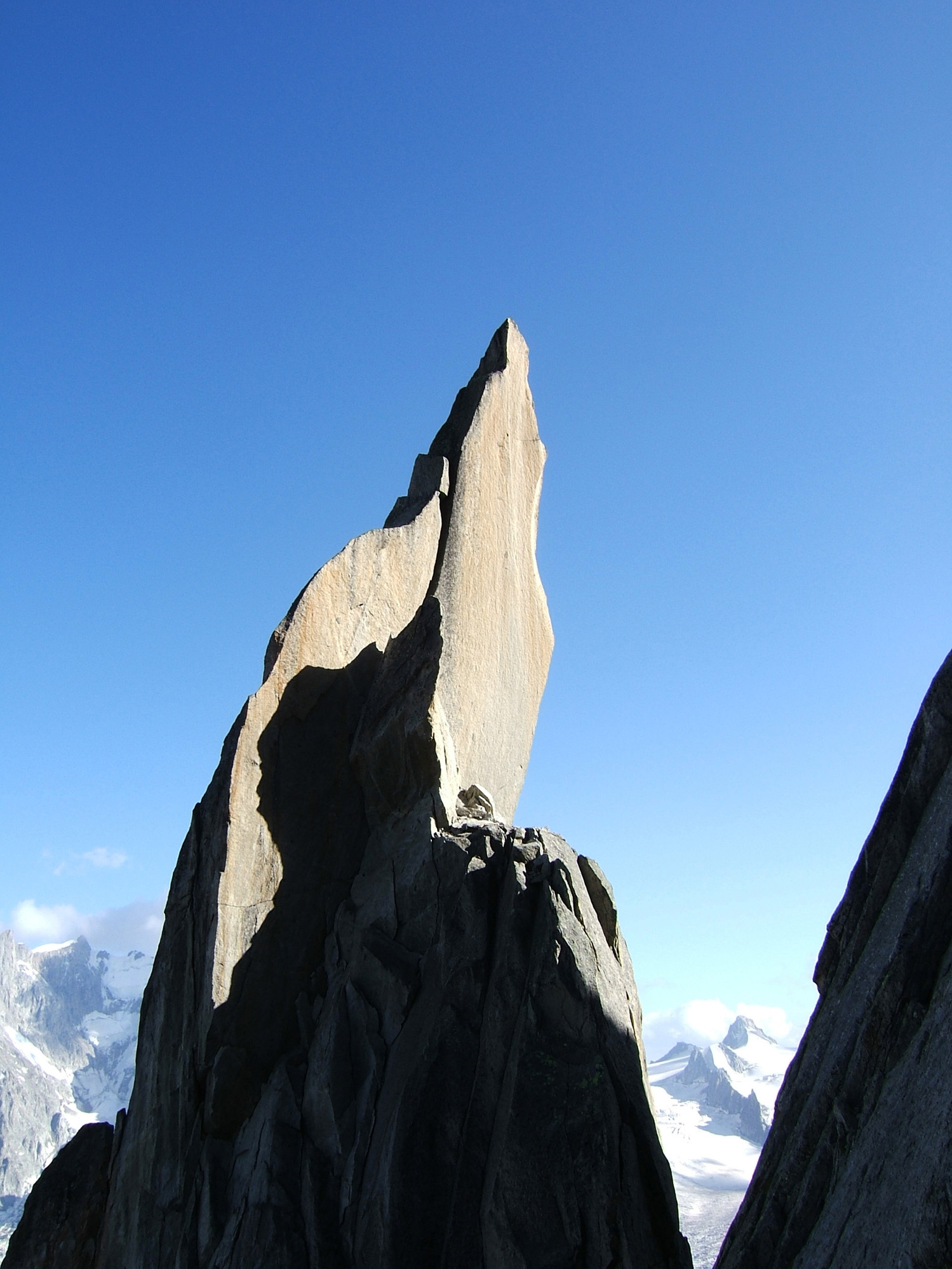 L'aiguille de Roc